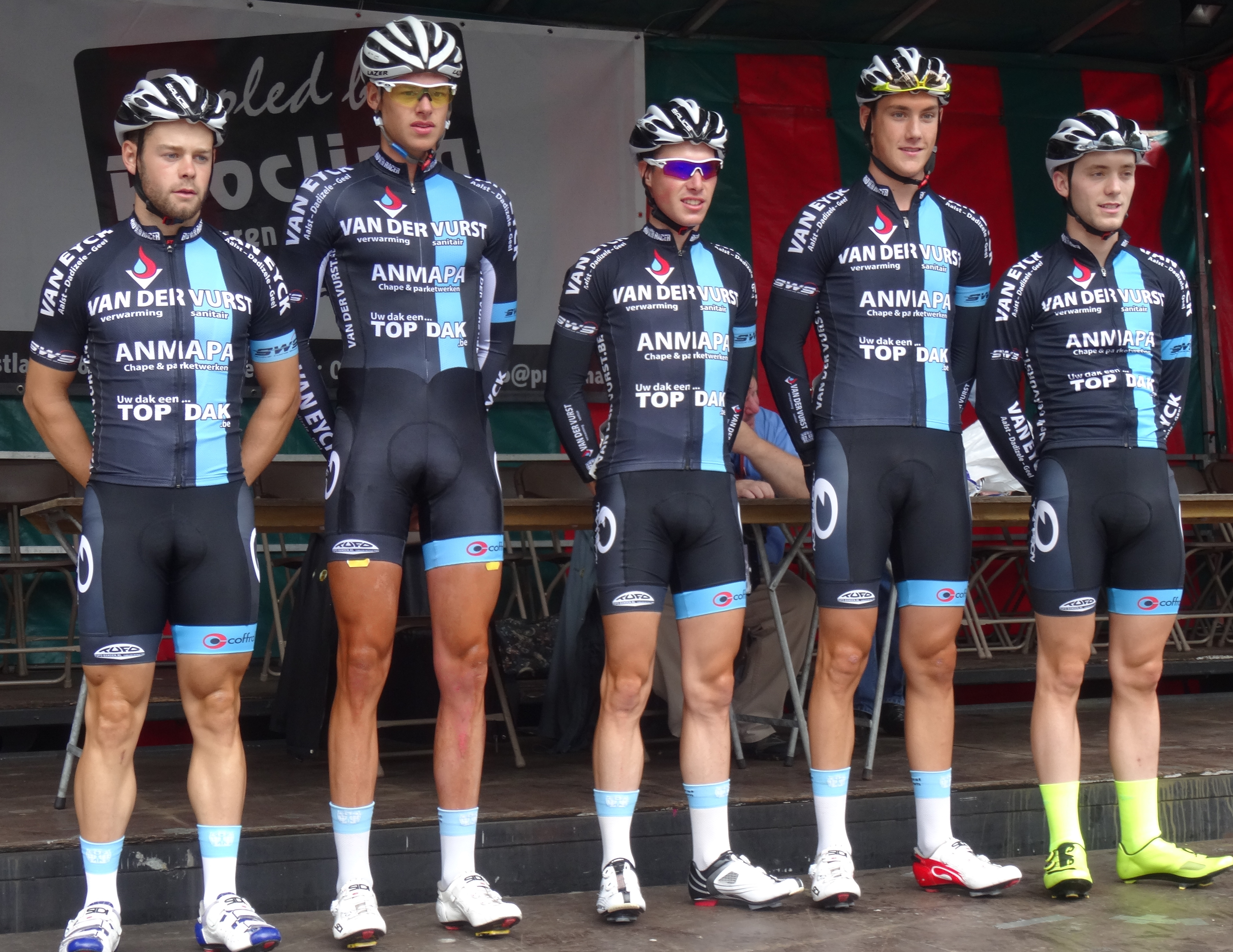 Reportage photographique réalisé le dimanche 10 août à l'occasion du départ et de l'arrivée de la Flèche du port d'Anvers 2014 à Merksem (Anvers), Belgique.